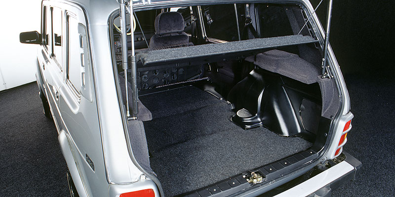 VISTA INTERIOR DESDE EL PORTON LADA NIVA LARGO 2131